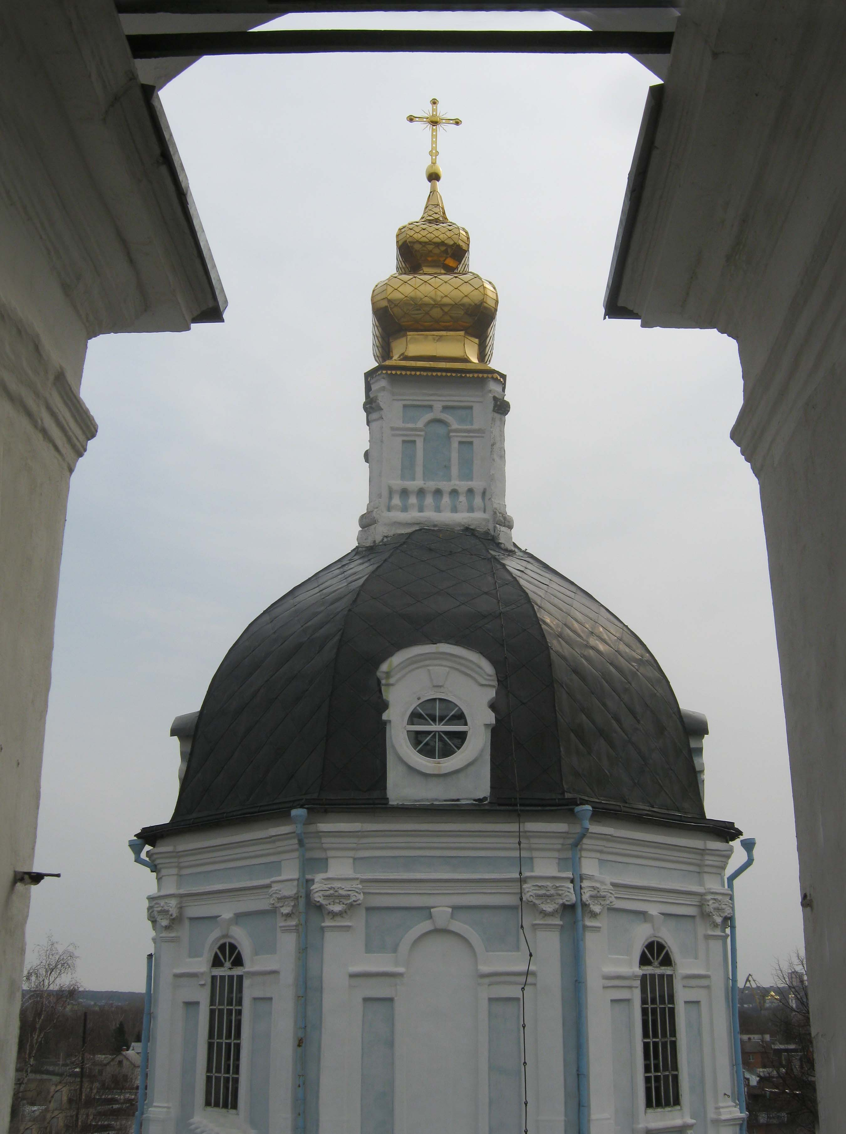 Церковь Введенская с иконостасом (Москва и Московская область, Дмитров, Старо-Рогачевская улица, 47 (Заречье))